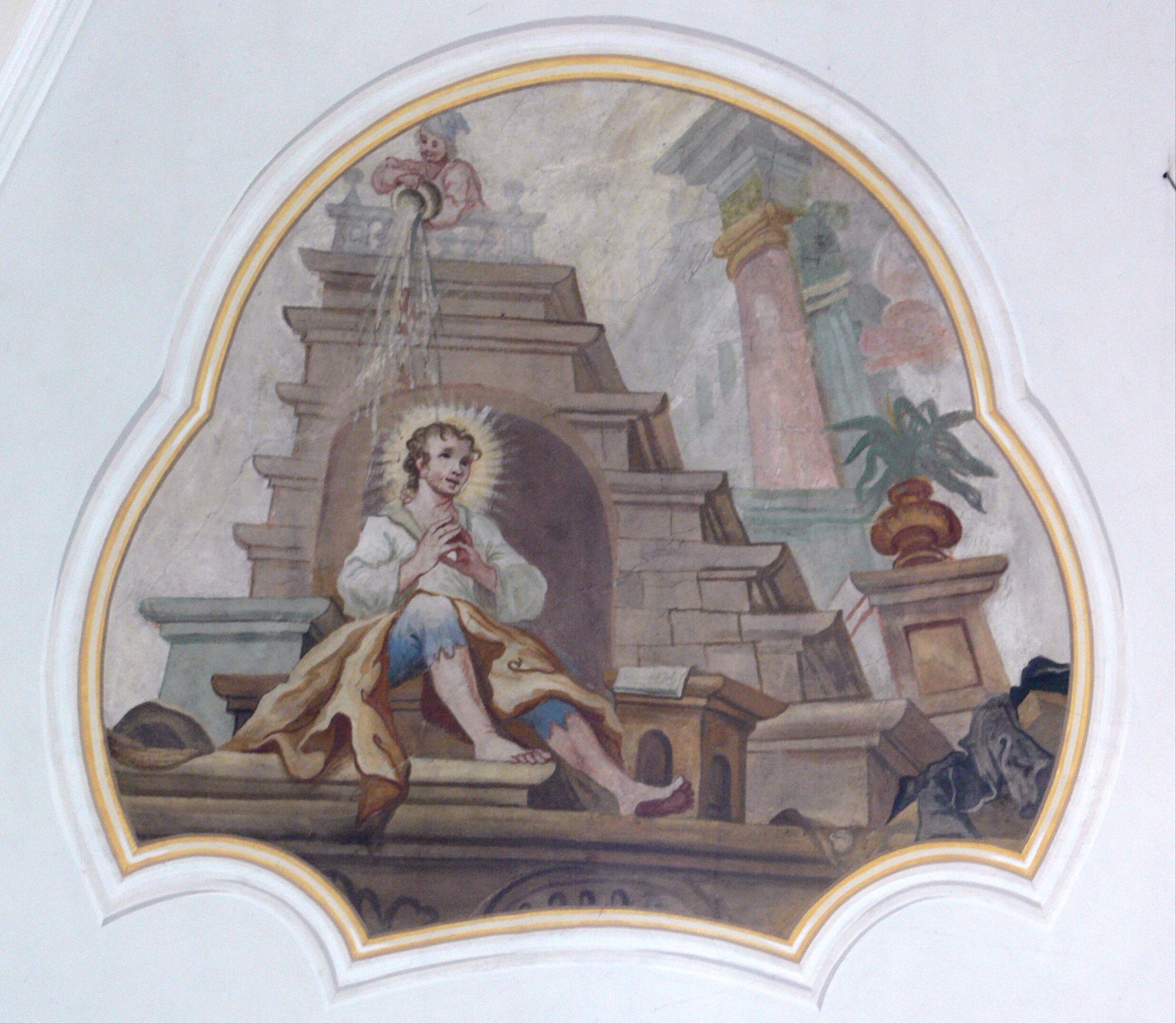 Pfarrkirche St. Martin, Langenargen, Bodenseekreis Deckengemälde von Anton Maulbertsch (sen.), 1732-1733: Hl. Alexius von Edessa